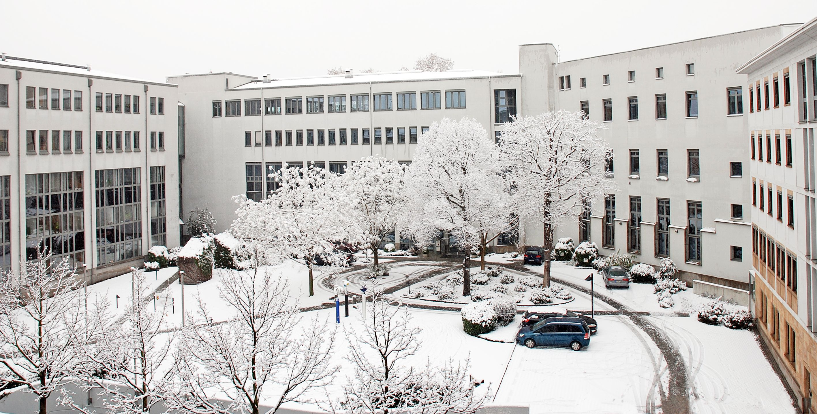 Ministerium für Wirtschaft, Klimaschutz, Energie und Landesplanung von Rheinland-Pfalz